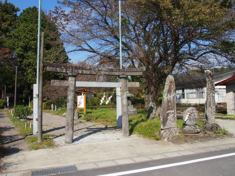 白髭神社_松井田町原